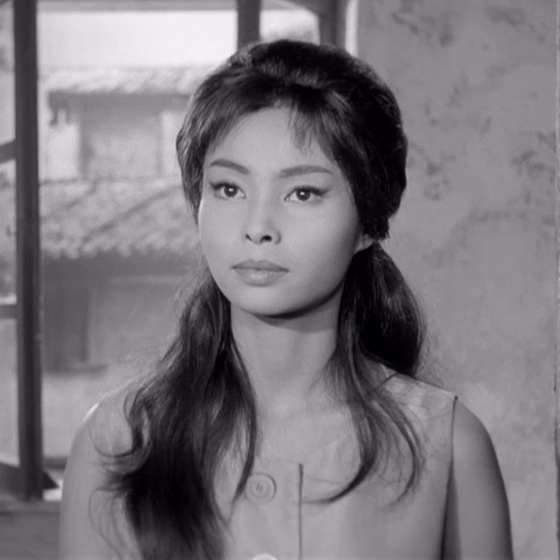 Akiko Wakabayashi nel film Akiko (1961)